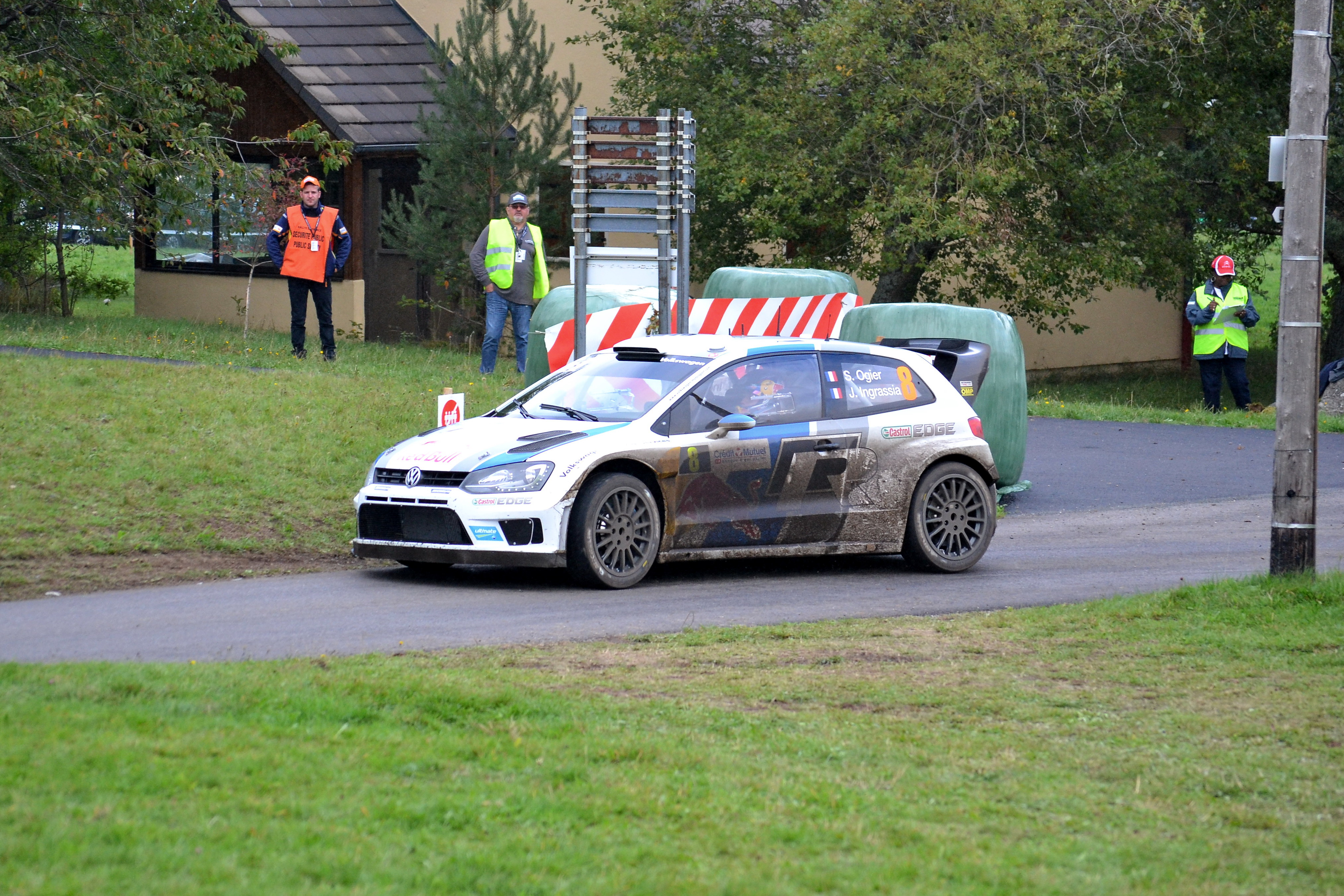 Rallye WRC France-Alsace 2013, ES13 Soultzeren - Pays Welche 2 à Labaroche. Volkswagen Polo R WRC - Sébastien Ogier / Julien Ingrassia